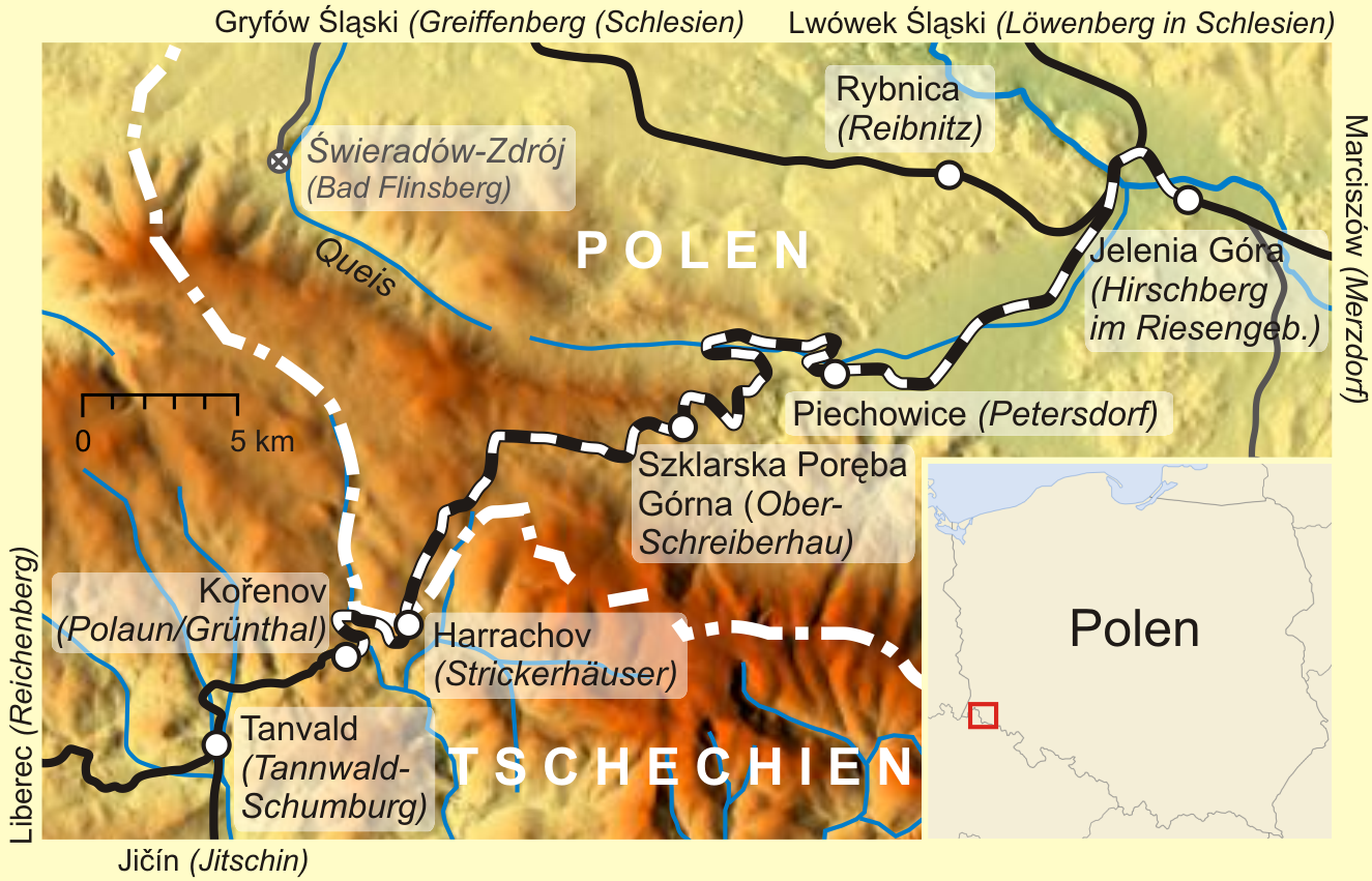 Verlaufskarte der Zackenbahn